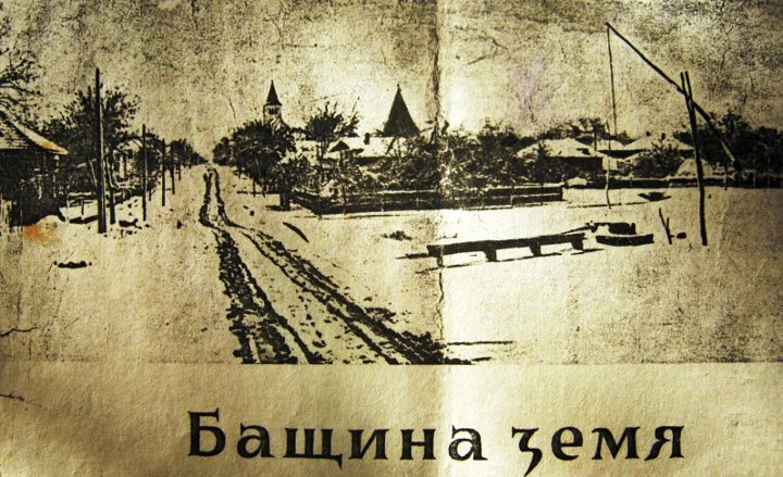 Красив пейзаж в Бърдарски геран. Поглед от юг с кулата на вила Феребоско и камбанарията на църква св. Йосиф. Заснета 1945 - 1947